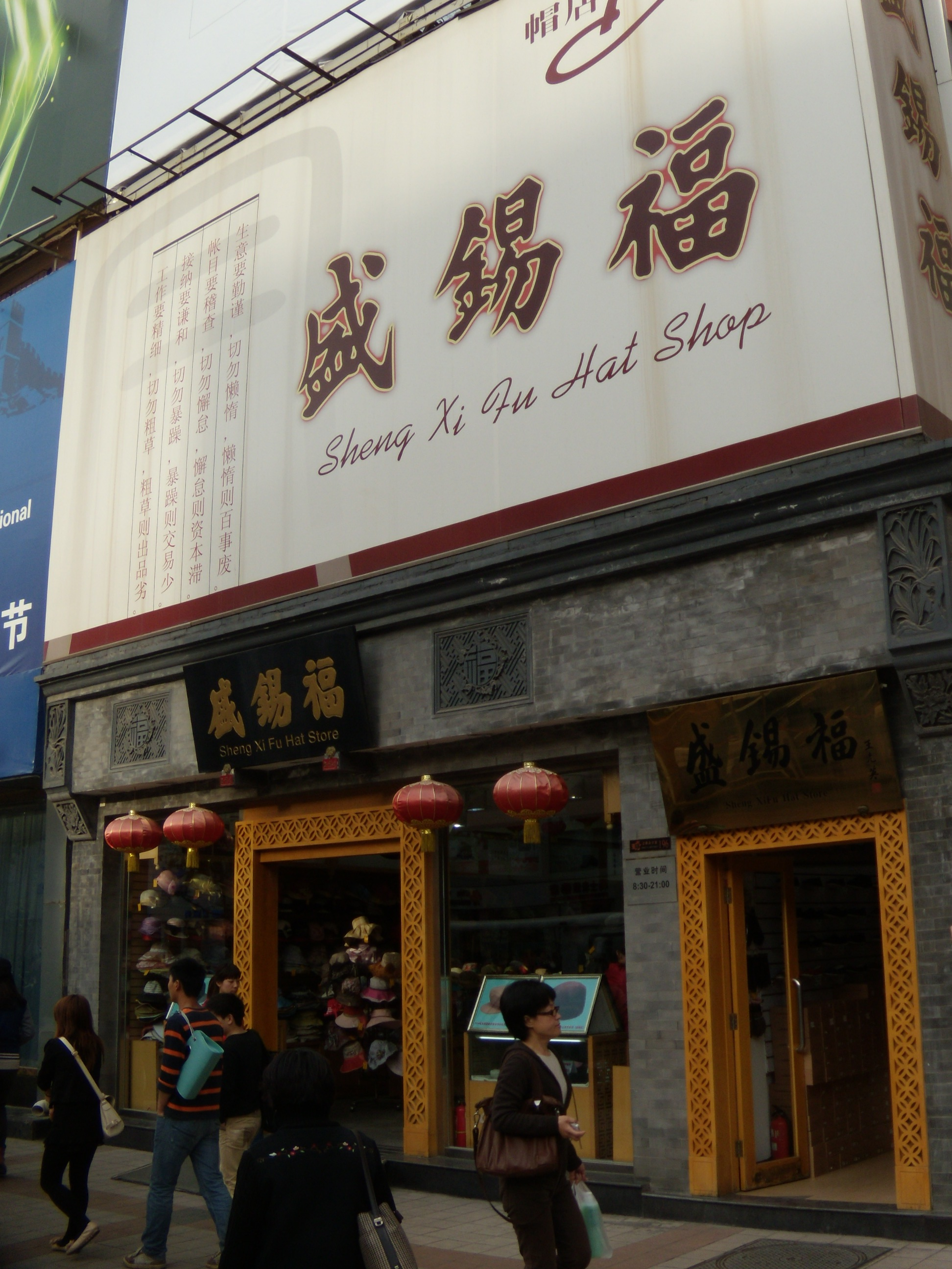 盛锡福，位于王府井大街